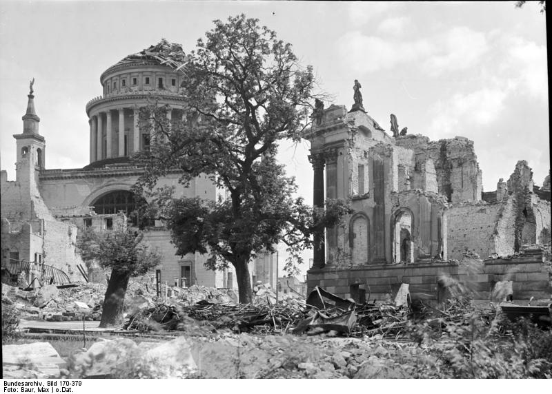 Potsdam.- Ruinen